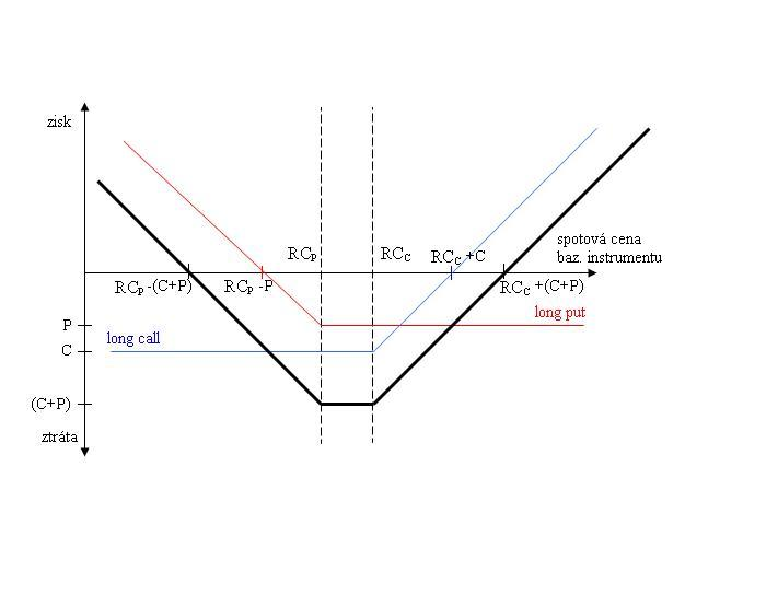 Česky: LONG STRANGLE